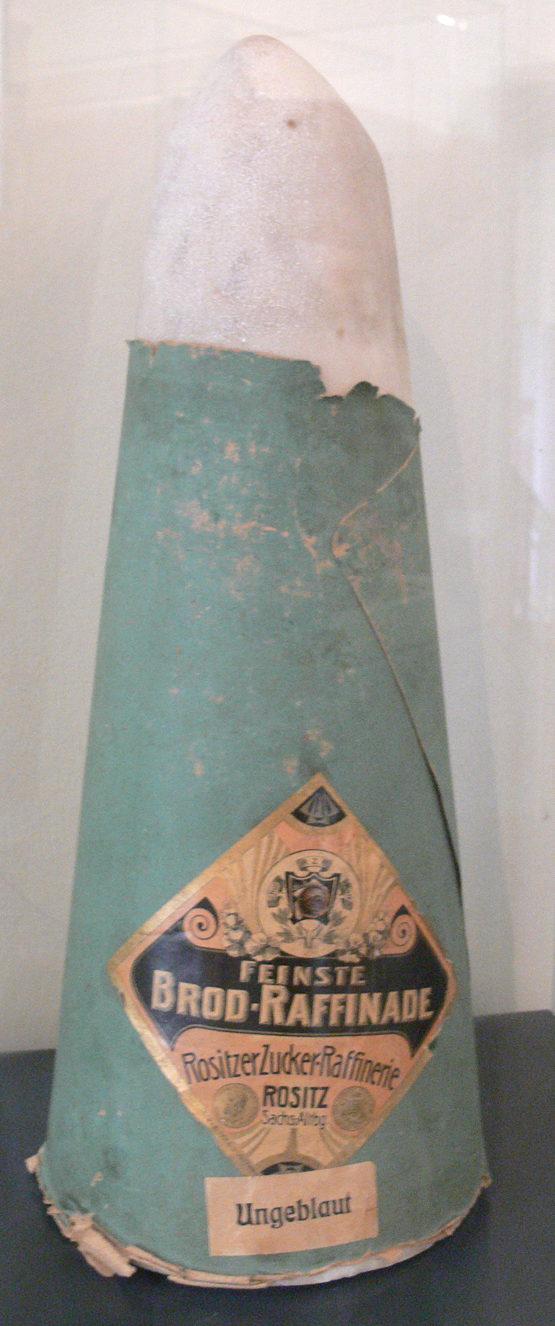 Zuckerhut der Raffinerie Rositz, um 1890; Zucker-Museum Berlin